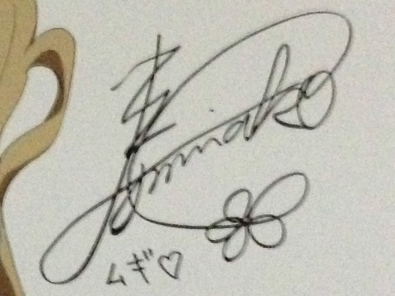 《K-ON！輕音部》琴吹紬聲優壽美菜子的簽名。